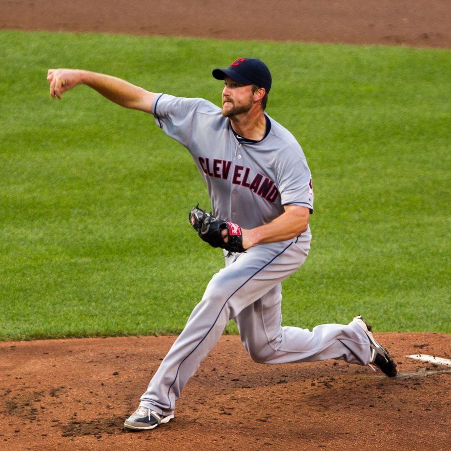 Derek Lowe